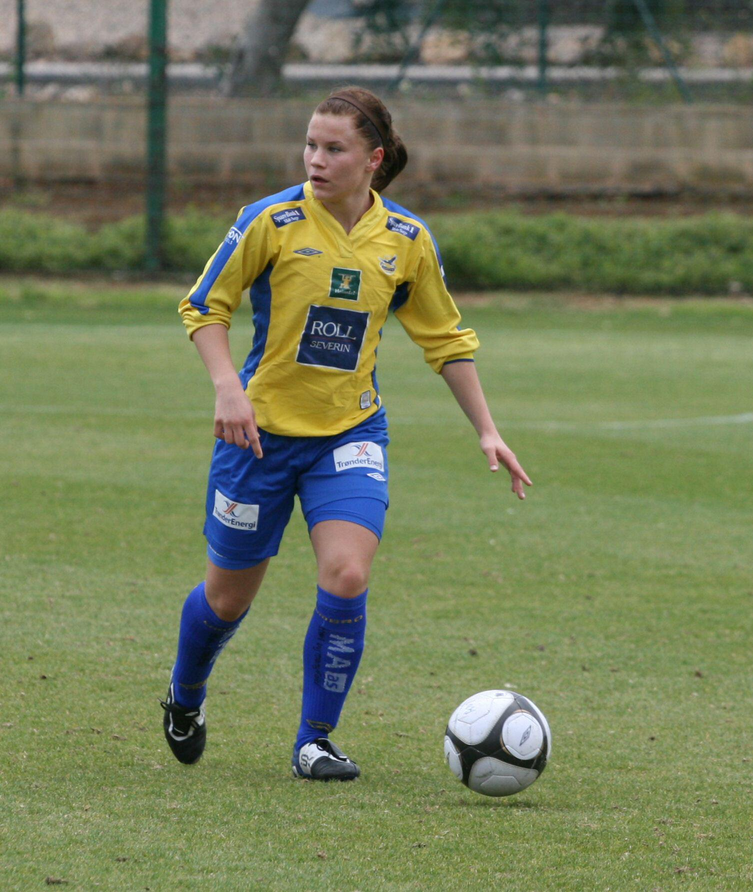 Fotballspilleren Anne Grete Storli